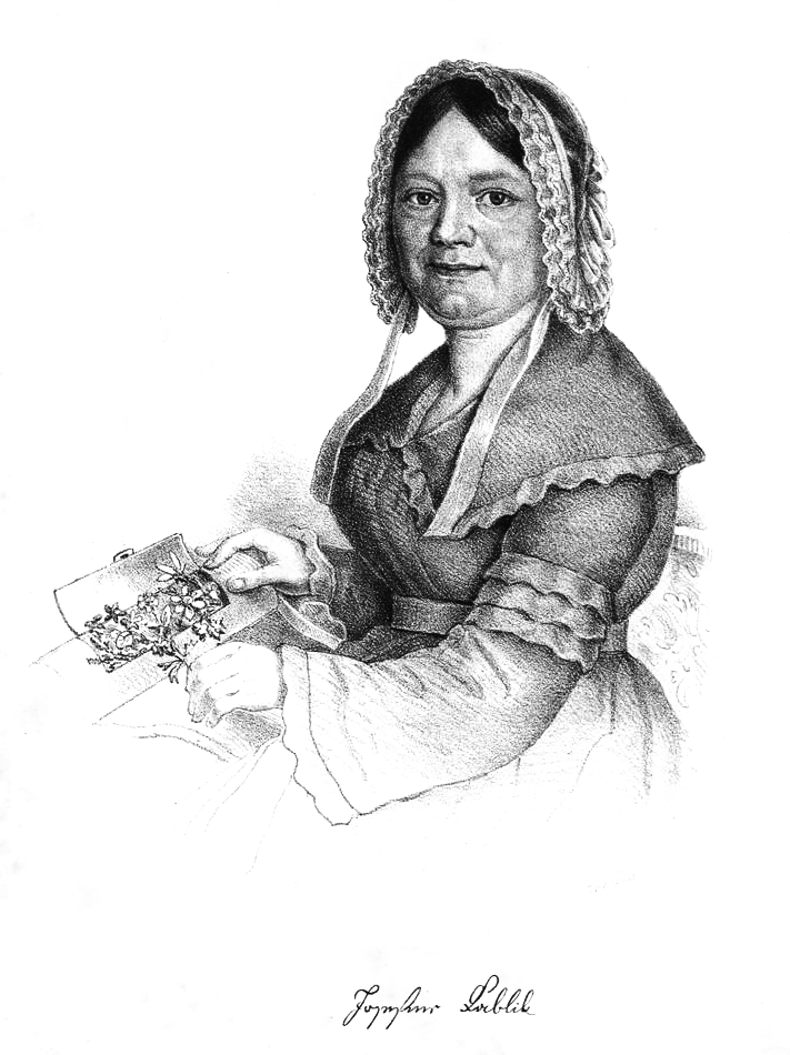 Josefína Kablíková (1787-1863), česká botanička